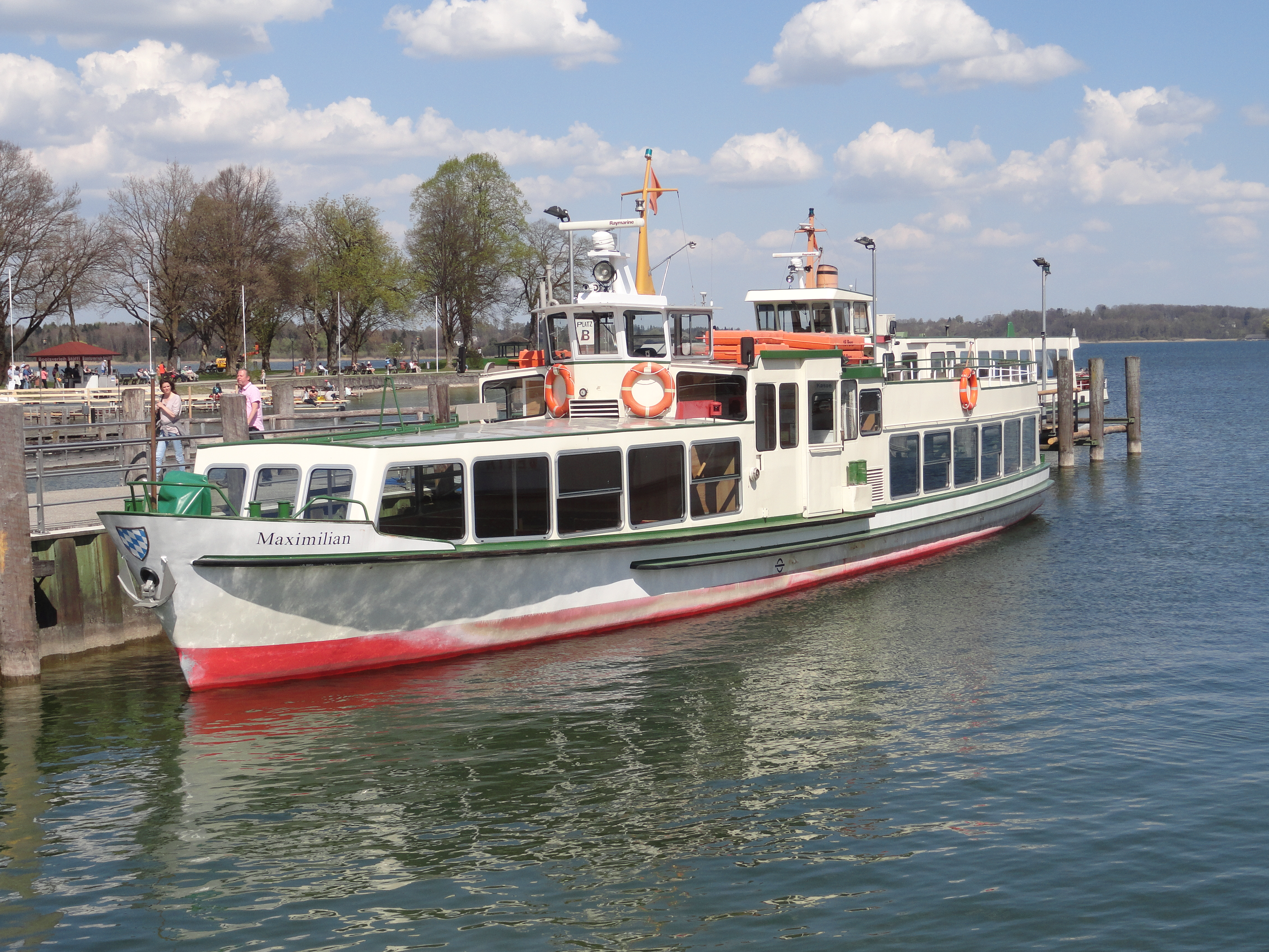 Das Fahrgastschiff Maximilian an einem Steg der Anlegestelle in Prien am Chiemsee